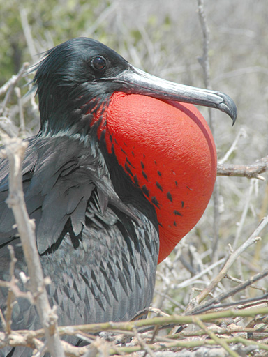 Male frigatebird, Galapagos Islands, Ecuador